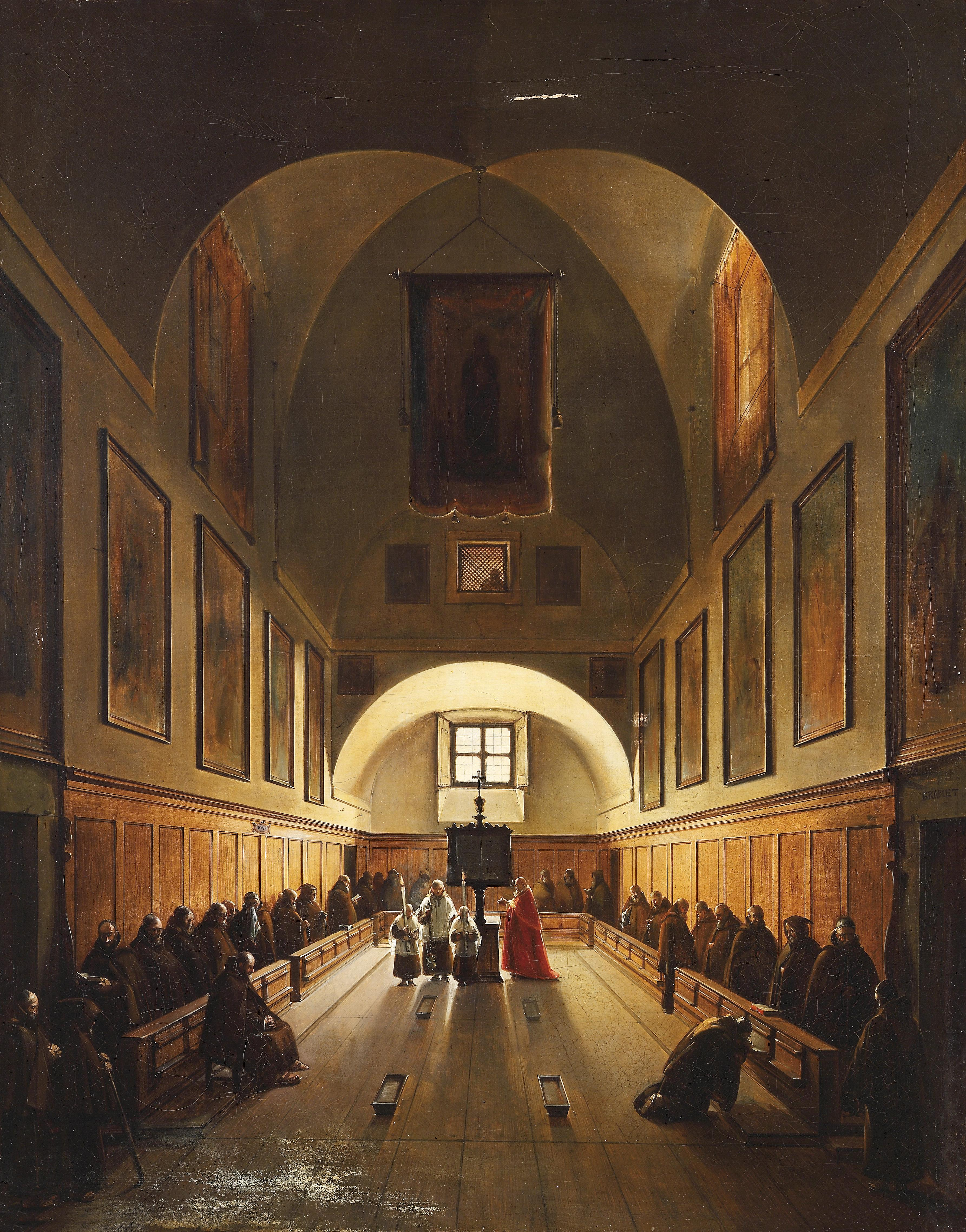 Der Chor der Kapuzinerkirche Santa Maria Immacolata a via Veneto in Rom, auf dem Portal signiert: GRANET. Öl auf Leinwand, 93 x 73,5 cm. Eine von mehreren Versionen des Gemäldes.